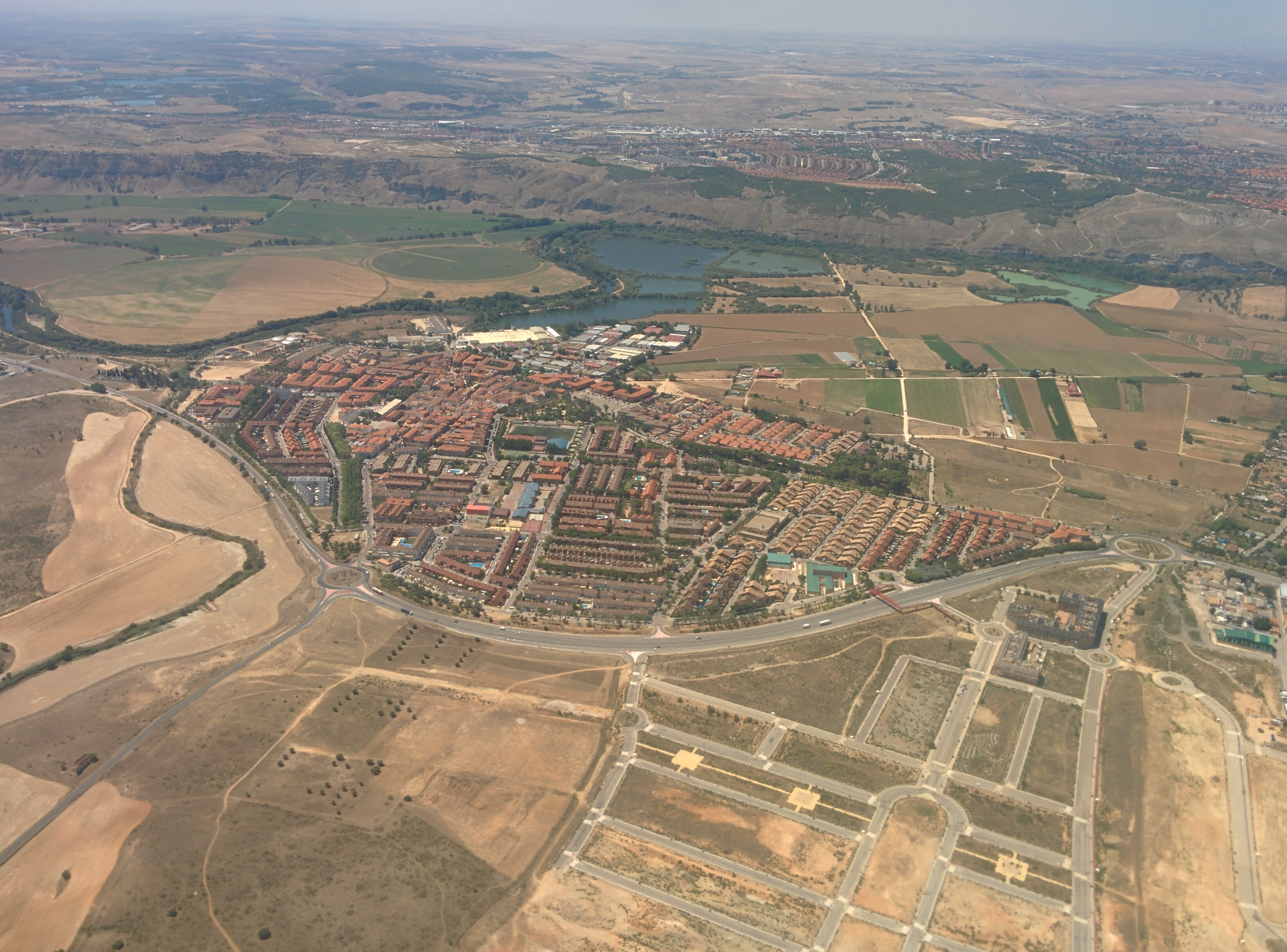 Vista aérea de Velilla de San Antonio (Madrid, España).